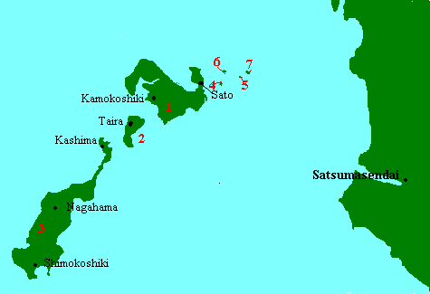 Map of the Koshikijima Islands, Kagoshima Prefecture, Japan (1.Kami-Koshikijima, 2. Naka-Koshikijima, 3.Shimo-Koshikijima,4.Chikajima,5. Futagojima, 6.Nojima,7.Okinojima)